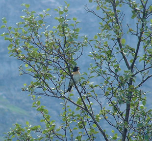 Bjørkefink.